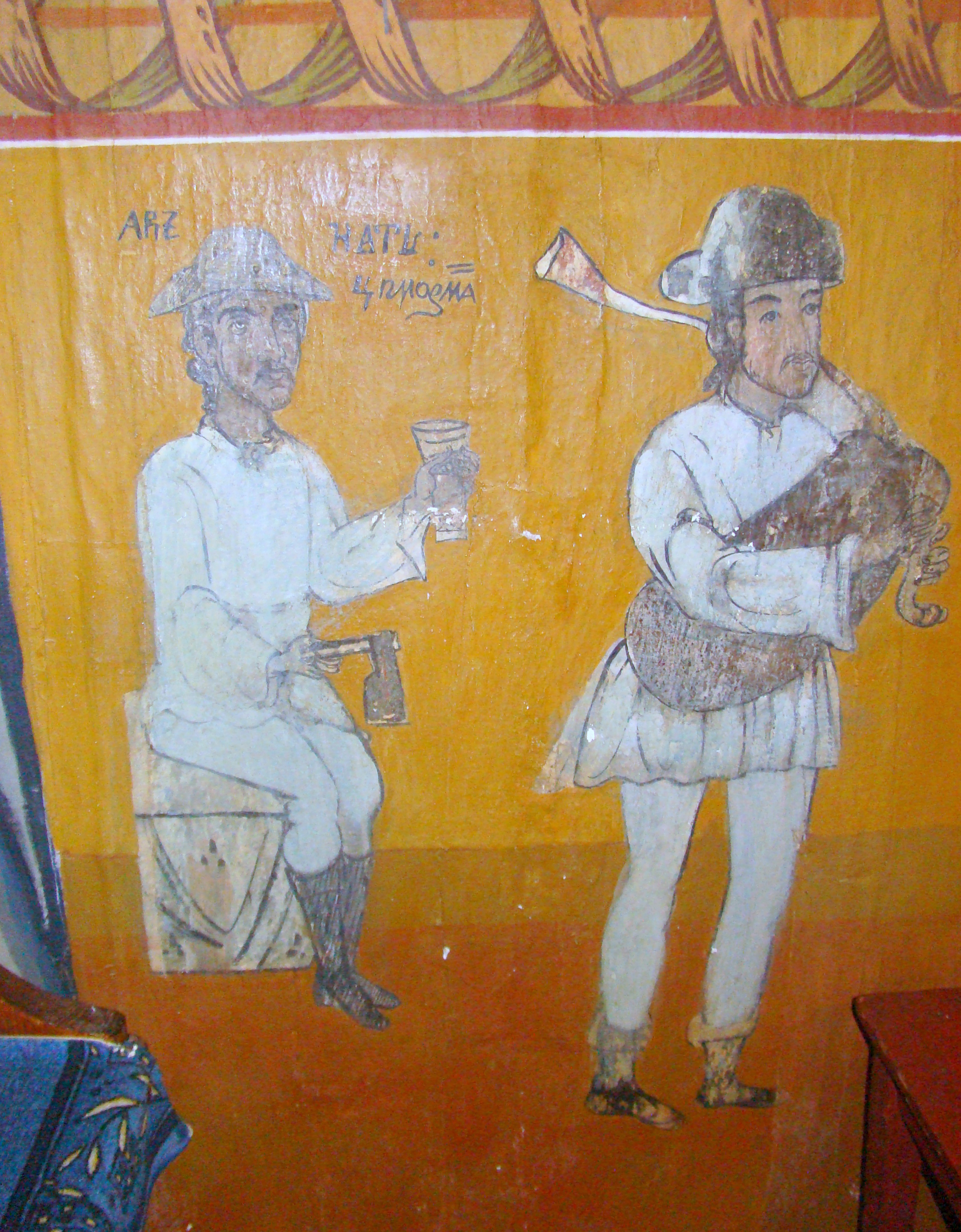 Biserica de lemn „Sfinții Arhangheli” din Năsal